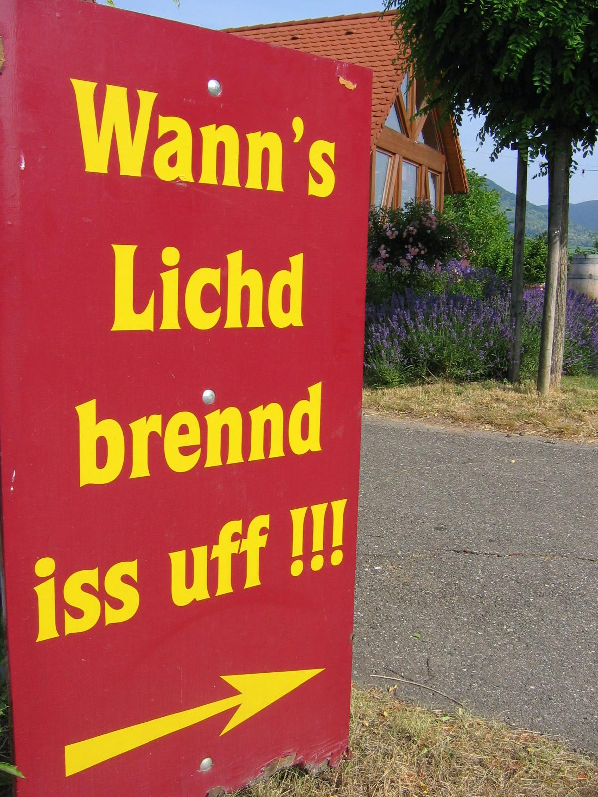 Pfälzisches Schild an der Weinstraße